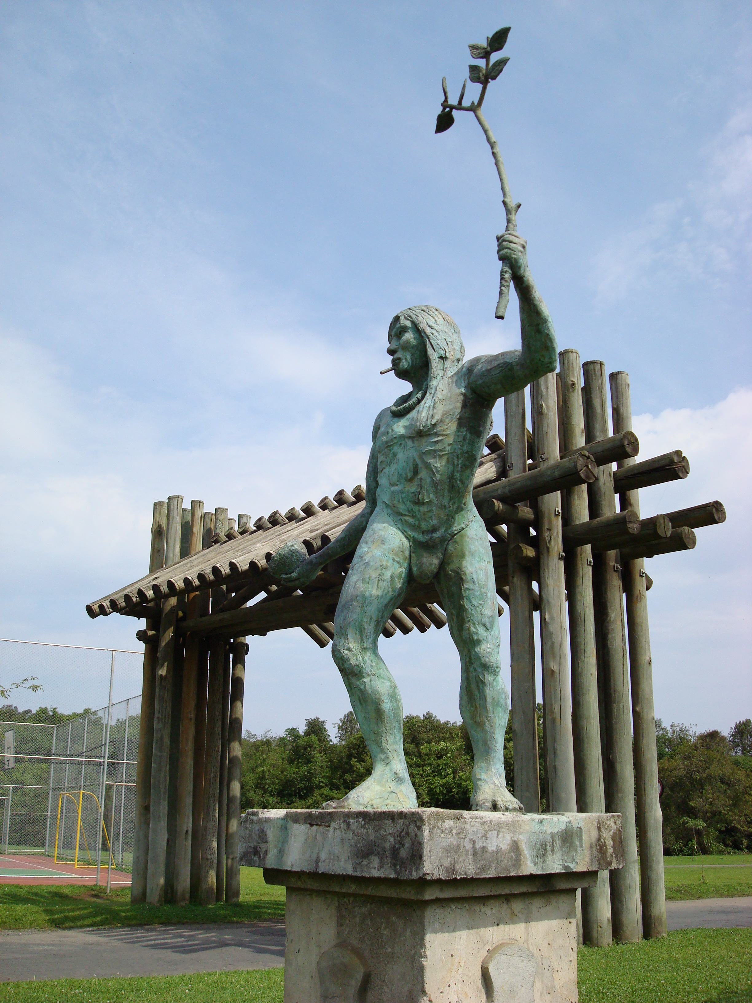 Entrada do Parque Tingüi, Curitiba, Brasil. Na foto, estátua do Cacique Tindiqüera, homenagem aos indígenas que habitavam esta região, um portal e uma cancha poliesportiva ao fundo.